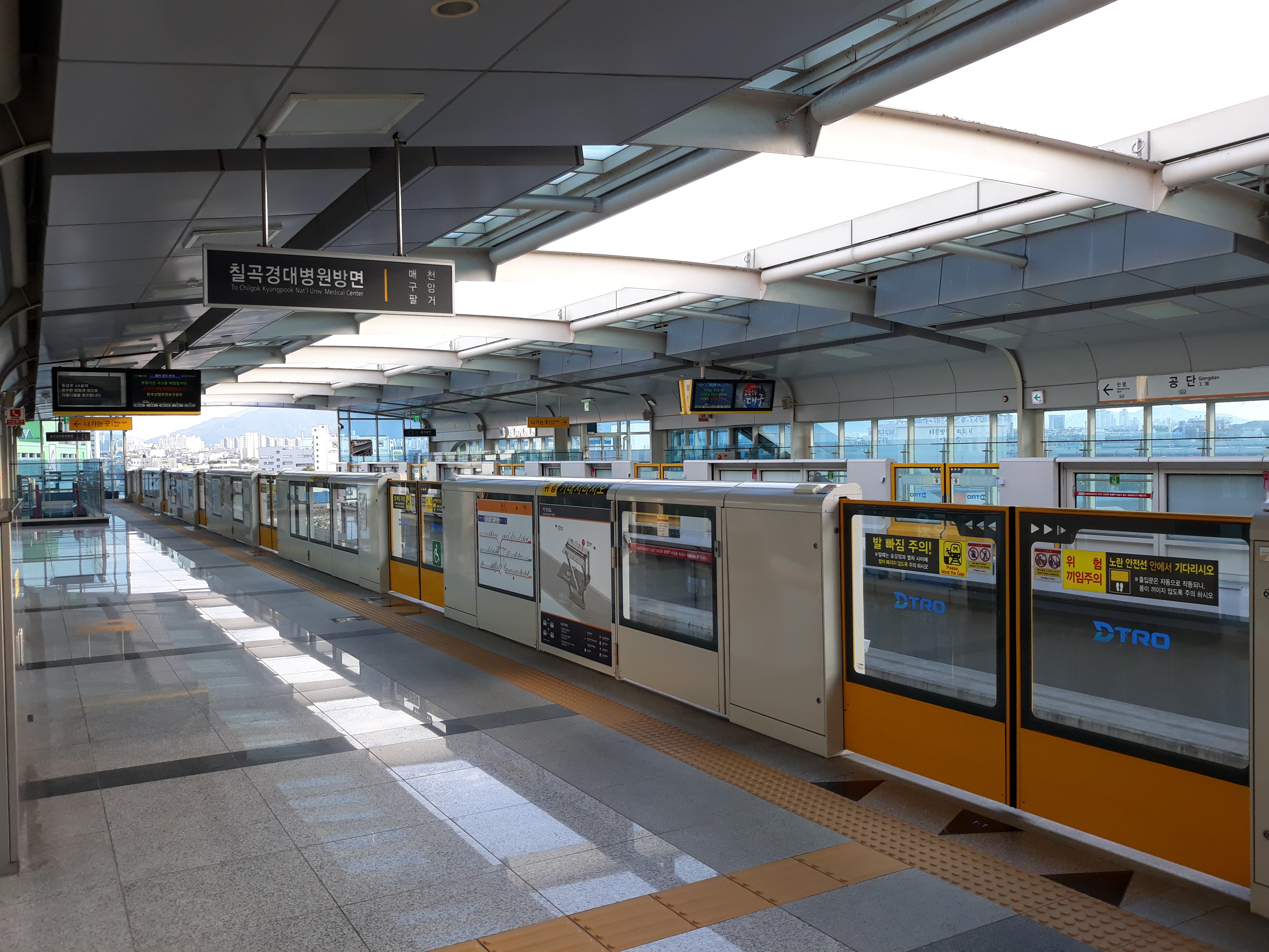 공단역 승강장(칠곡경대병원 방면)